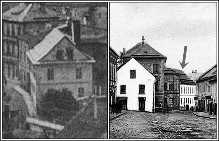 Nweh Shalom Israelitischer Bethausverein Bielsko Bielitz